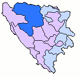 BosniaRegion BanjaLuka